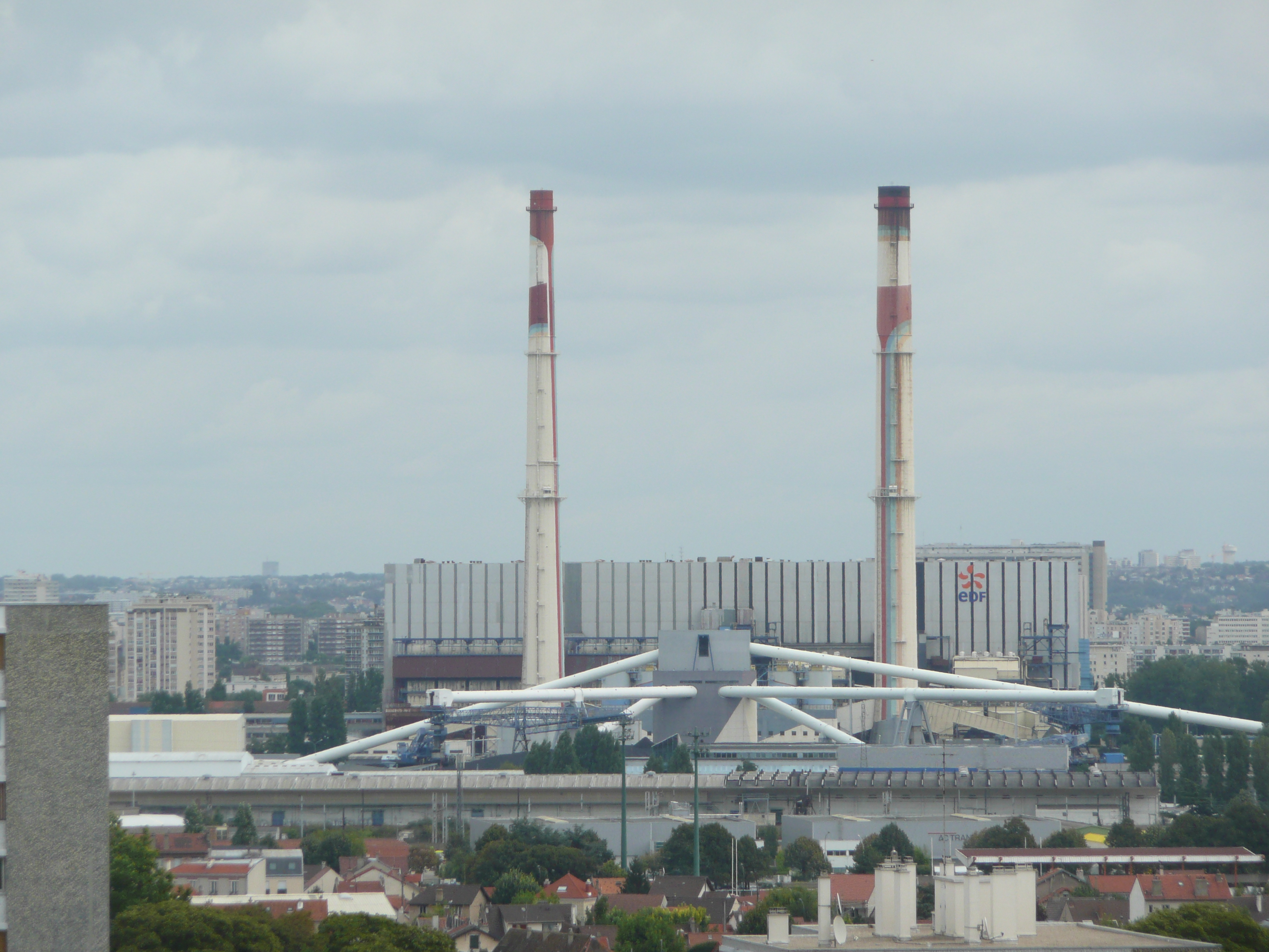 Centrale thermique de Vitry-sur-Seine (France).